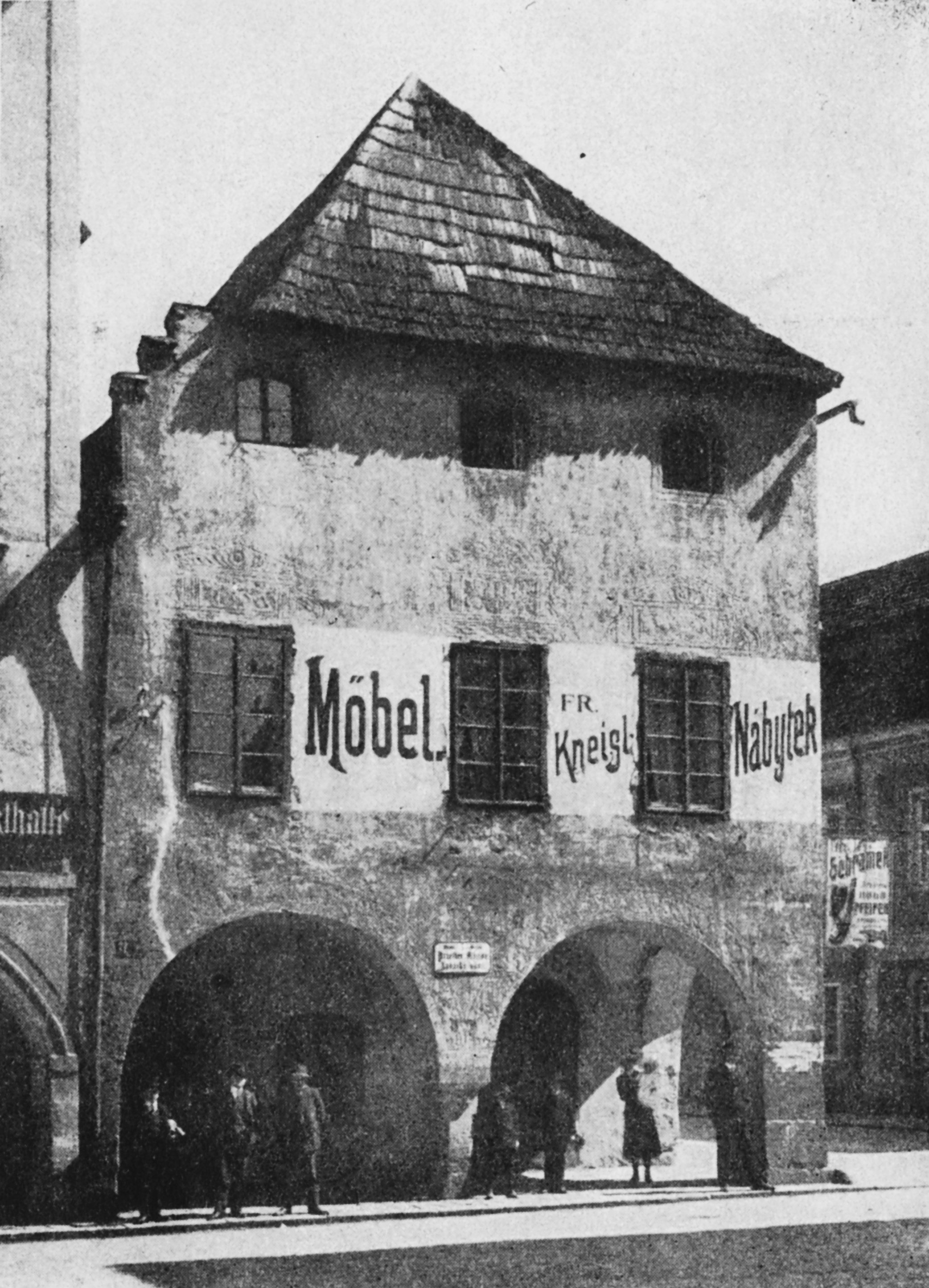 Album starých Budějovic. Kneisslův dům na rohu Kněžské a Kanovnické. Také známý jako Neuwerthův dům, Dům nábytku, Obchodní dům Maxirak (Ameriguide) a Kněžská 10. (orig. text: Kneislův dům v Kněžské ulici, s bohatou výzdobou sgraffittovou, datovaný rokem 1557. Před opravou.)